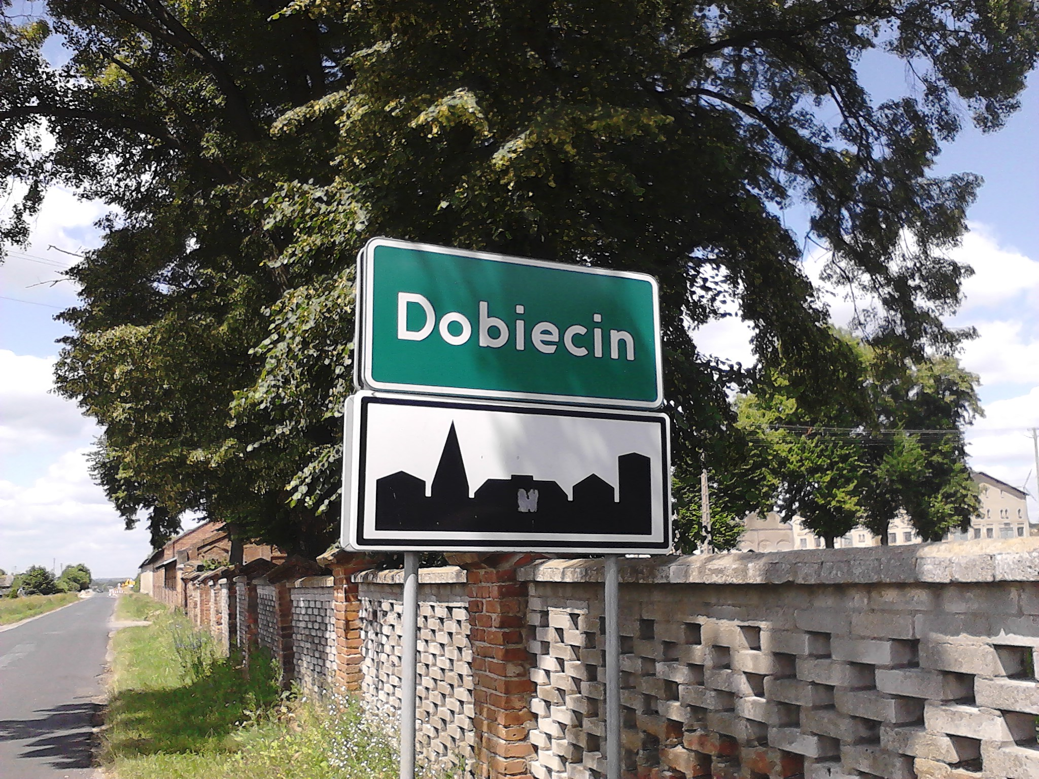 Tablica informacyjna przy wjeździe do Dobiecina